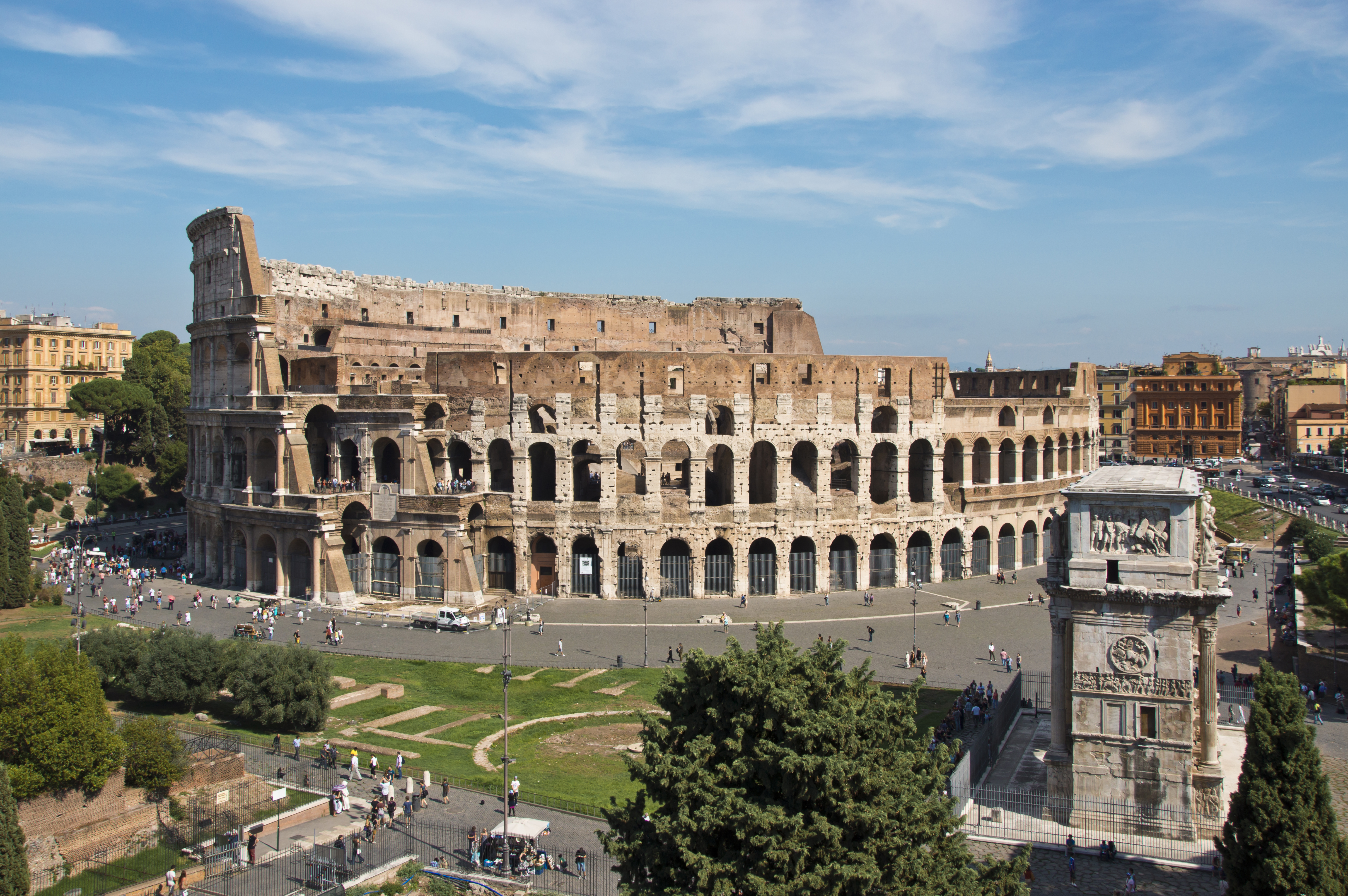 Roma / Rome - Lazio - Italia / Italy